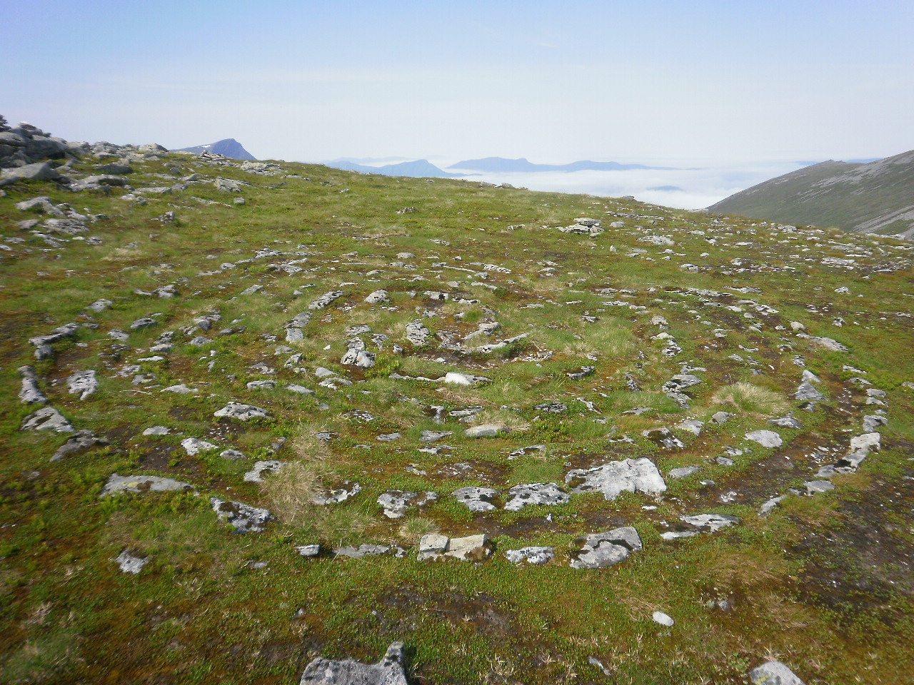 Kulturminne